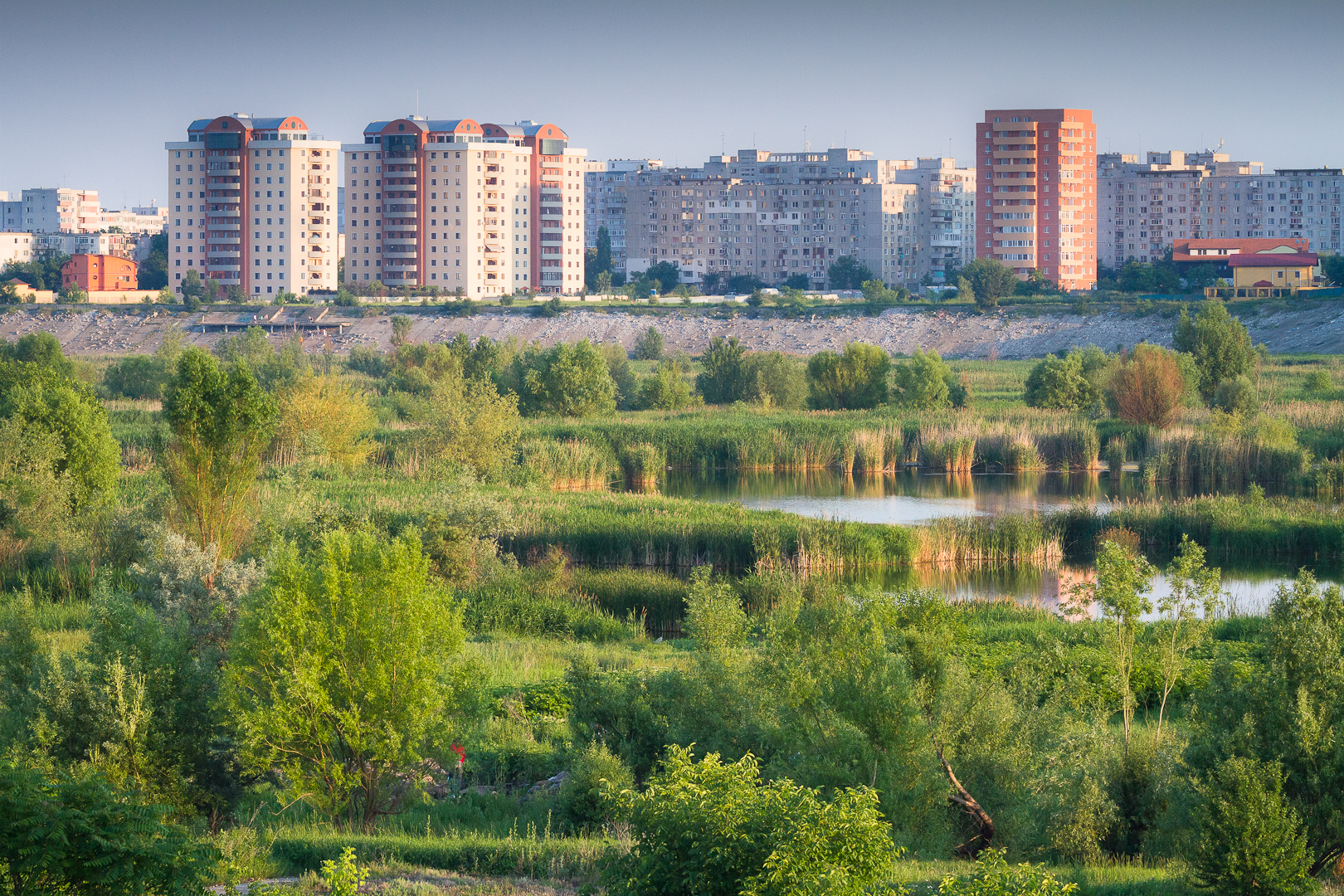 Lacul Vacaresti